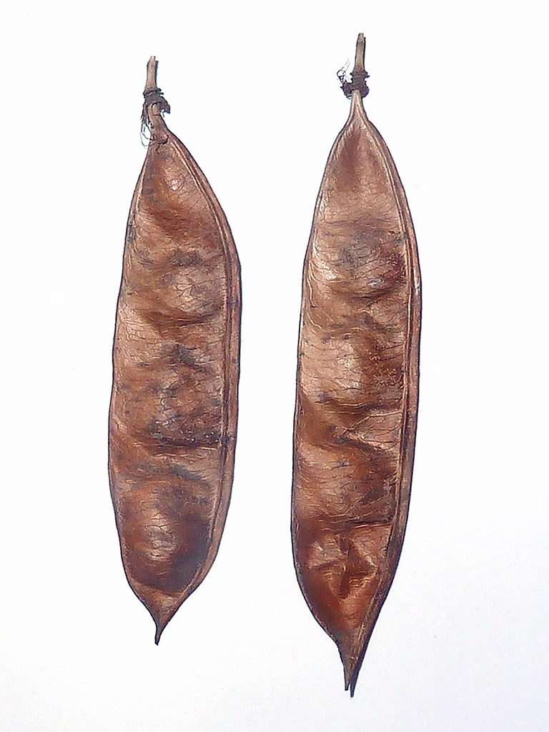 Cercis siliquastrum (Árbol del amor) - Legumbres con estrecha ala ventral - Ornamental/cultivado, Calle Rufino Blanco, Madrid (España).